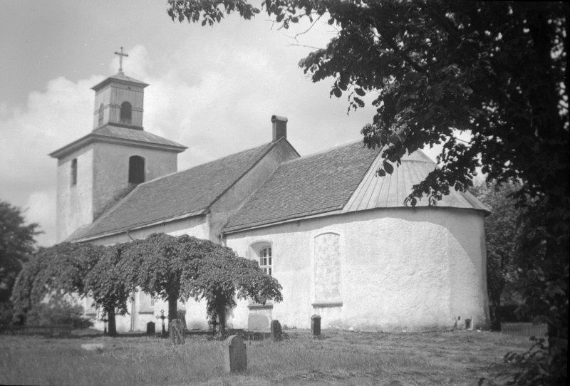 Kyrkan från sydöst. Före restaurering. Kategori: (01) ExteriörerKyrkan från sydöst. Före restaurering.